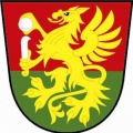 Česky: znak obce Paršovice